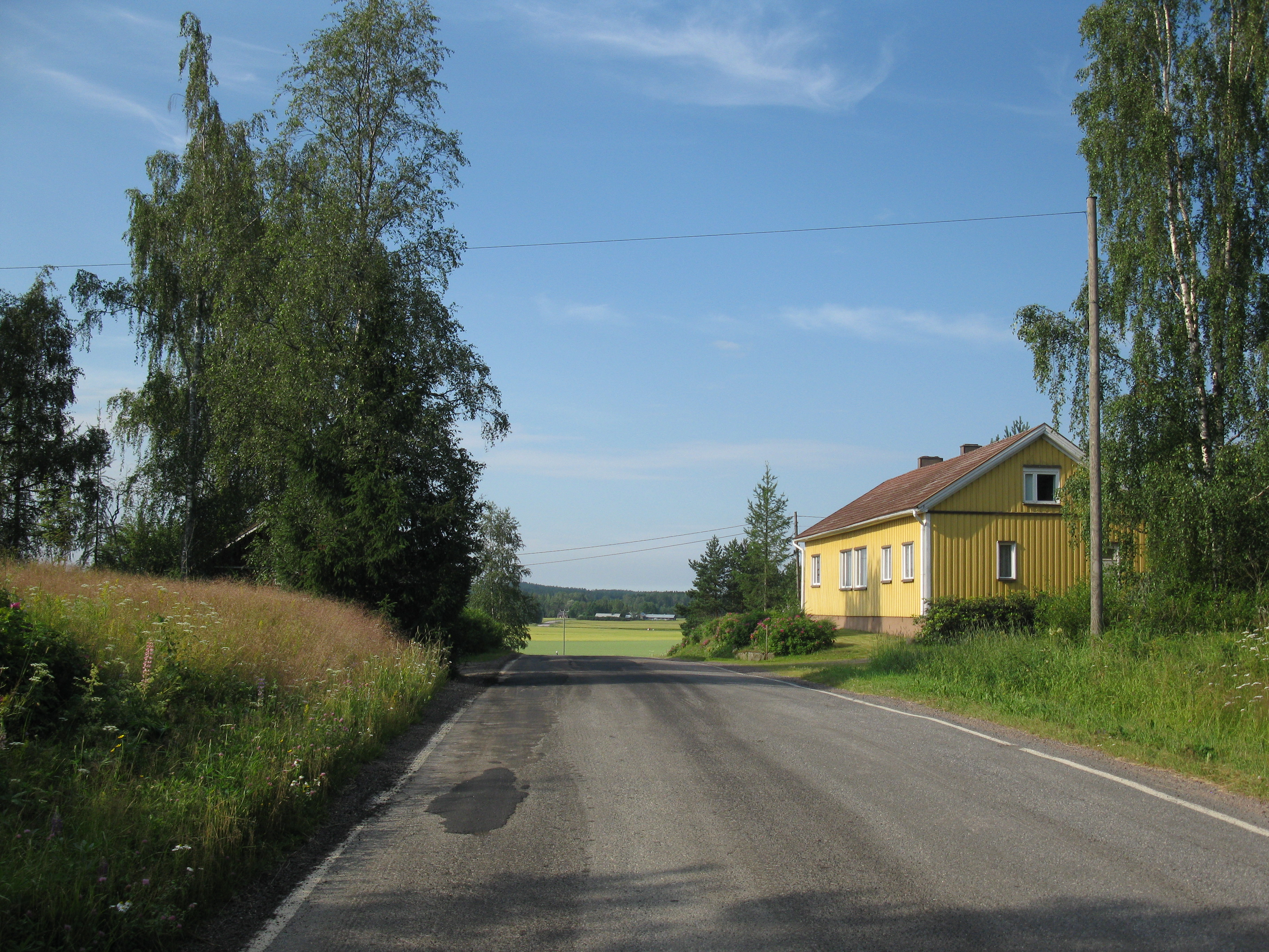 Lautelan kylää Somerolla. Kylän vanhaa tonttia yhdystien 2410 varressa.